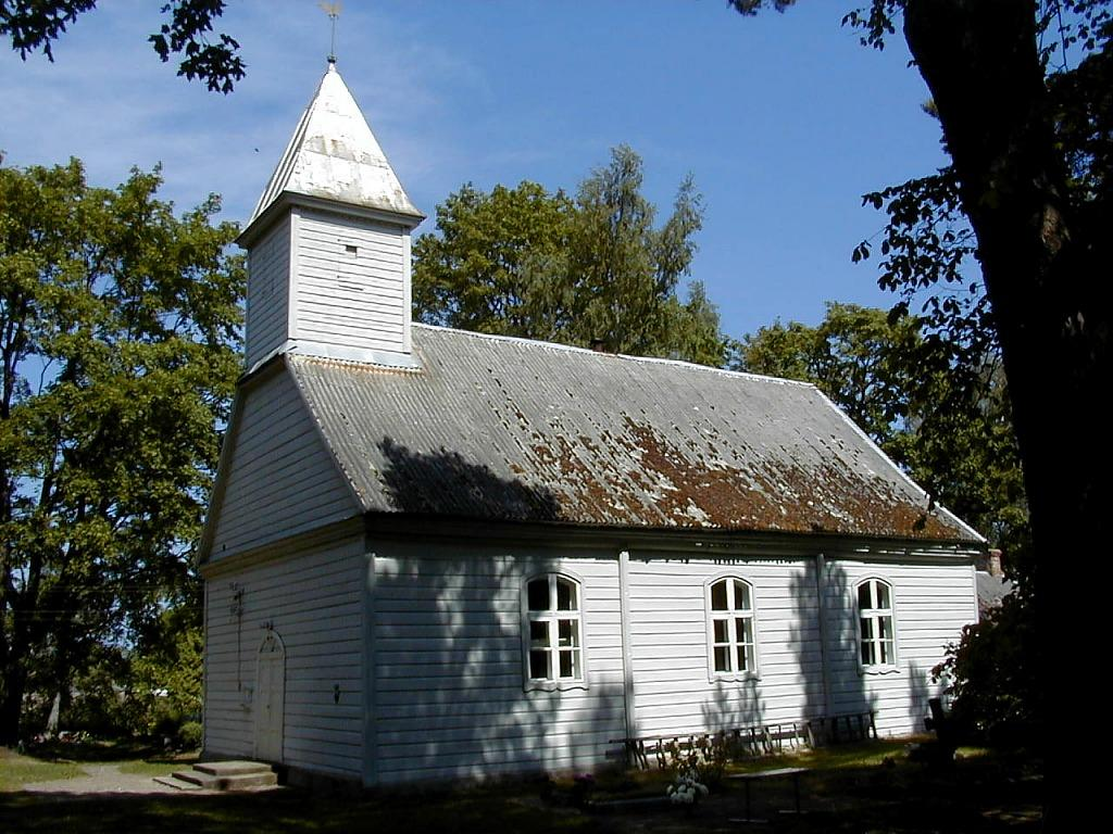 Mērsraga baznīca 2000-06-24